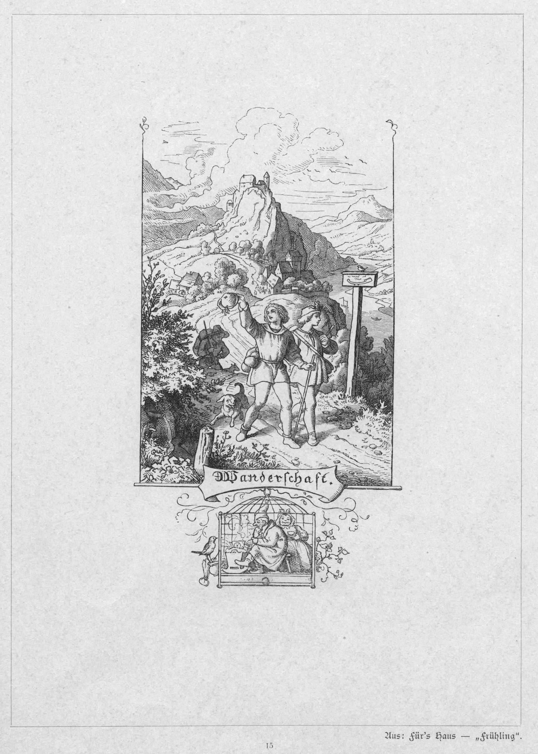 Wanderschaft. Aus: Für’s Haus – „Frühling“.